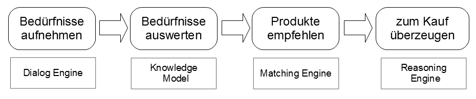 Darstellung eines typischen Guided-Selling-Prozesses